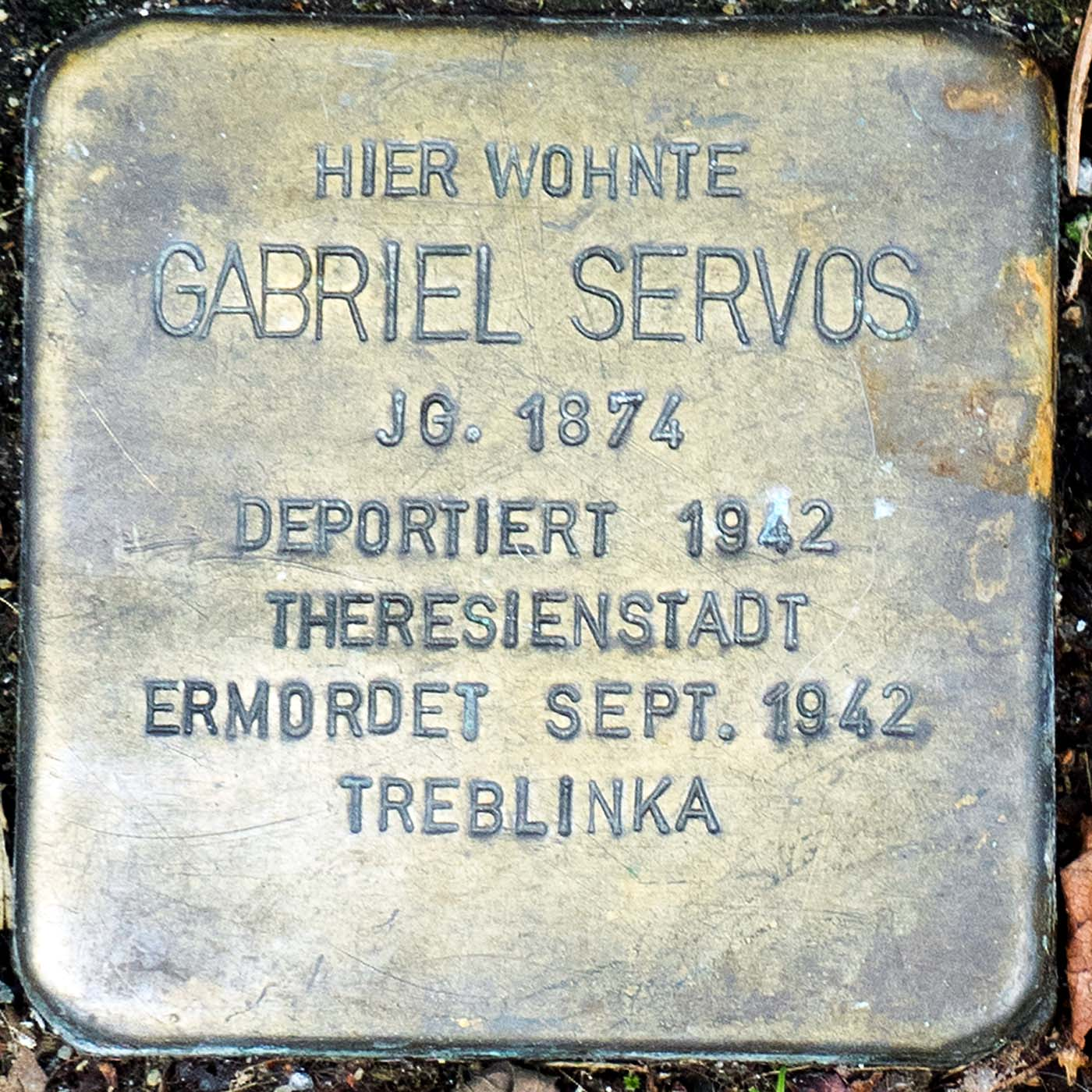 Stolperstein für Gabriel Servos (Willich)